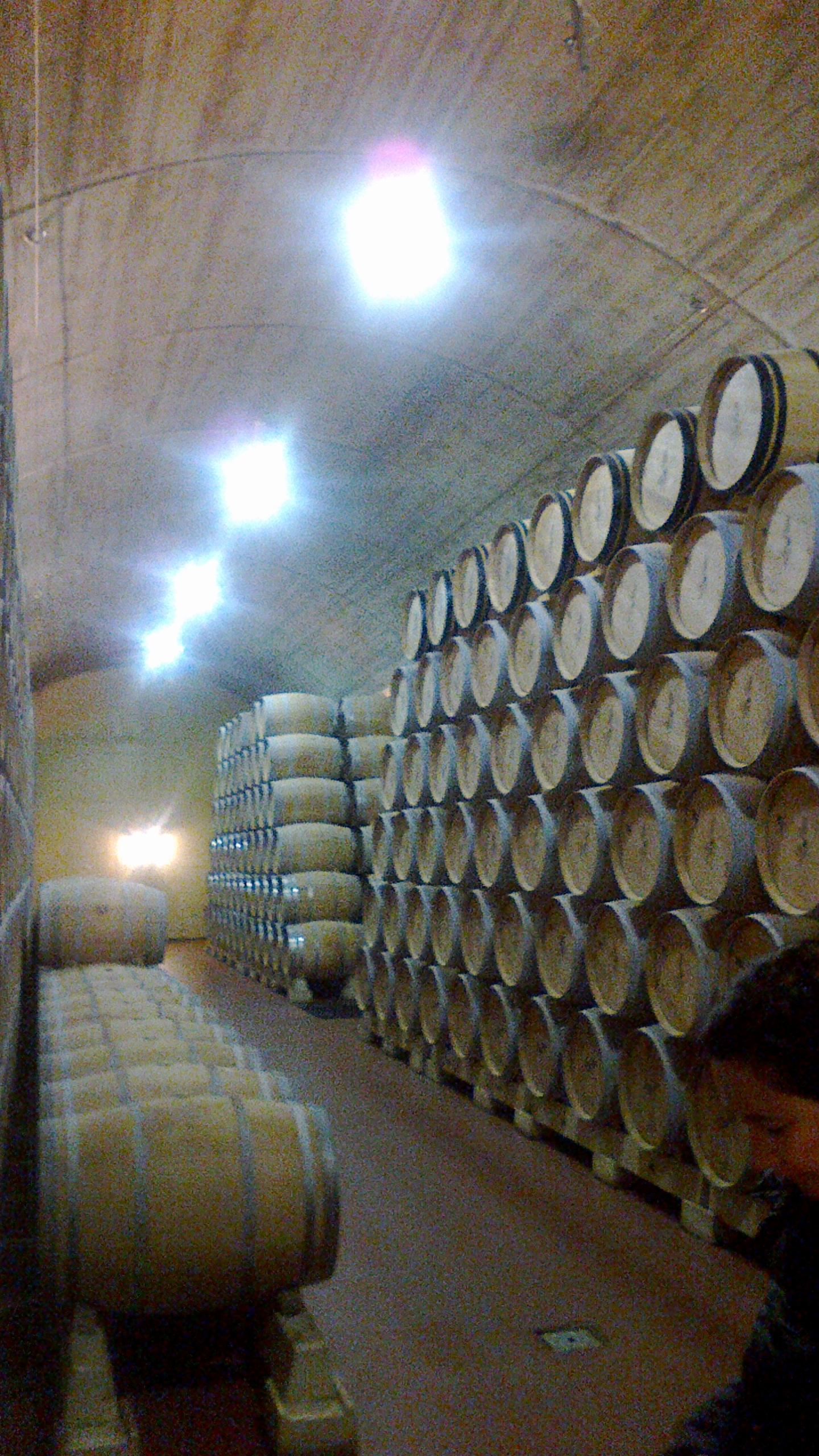 Luis Cañas upeltegia, Villabuena (Araba)